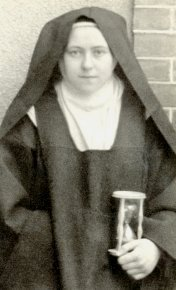 Fotografia originale della mistica Thérèse Martin. La fotografia è stata scattata nel 1896 da Celine Martin sorella della mistica.